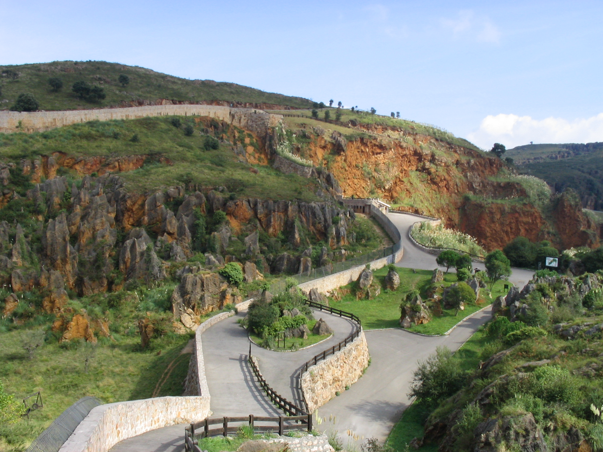 Parque de la Naturaleza de Cabárceno (Cantabria, España)